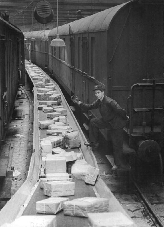 Zentralbild Sturm 3.12.1959 Vorweihnachtlicher Hochbetrieb beim Bahnpostamt I In diesen Wochen vor dem Weihnachtsfest haben die Kollegen des Bahnpostamtes I am Berliner Ostbahnhof alle Hände voll zu tun, um die vielen Paketsendungen rechtzeitig an die Empfänger zu befördern. Wesentlich gestiegen ist in diesem Jahr auch die Zahl der Geschenkpakete, die in die Bundesrepublik gehen. UBz: Durch Mechanisierung des Transportes wurde die Arbeit wesentlich erleichtert. Vom Transportband werden die Pakete direkt in die Züge verladen.